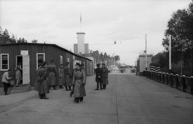 Aufhebung der Verkehrsbeschränkungen in der Nacht vom 11. zum 12. Mai 1949, 0.01 Uhr, an der Übergangsstelle Helmstedt-Marienborn. Übergangsstelle an der Autobahn Helmstedt-Marienborn von der sowjetischen Seite aus gesehen. Aufn.: Illus/Heilig 3248-49 12.5.49